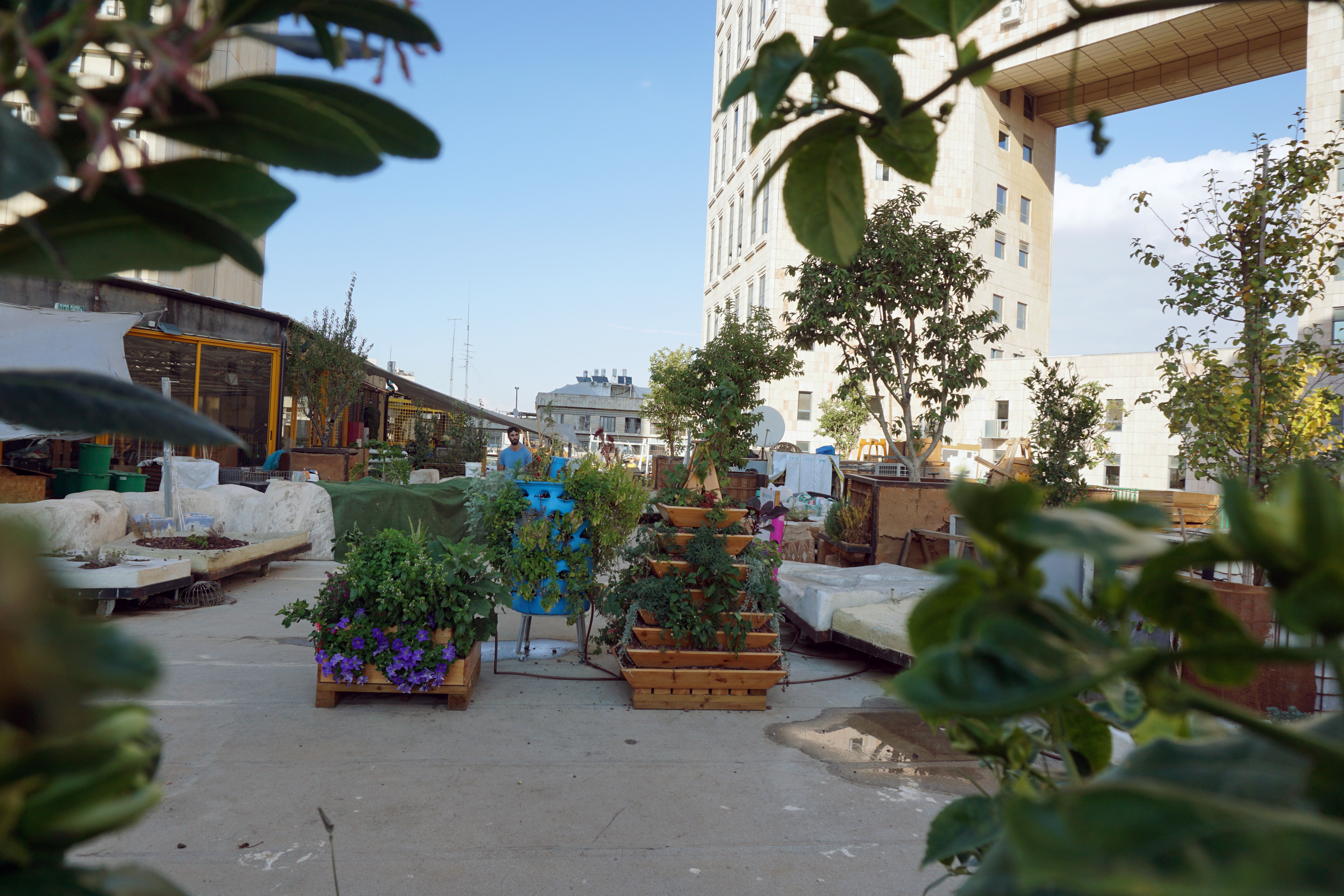 המרפסת של מוסללה The Terrace of Muslala